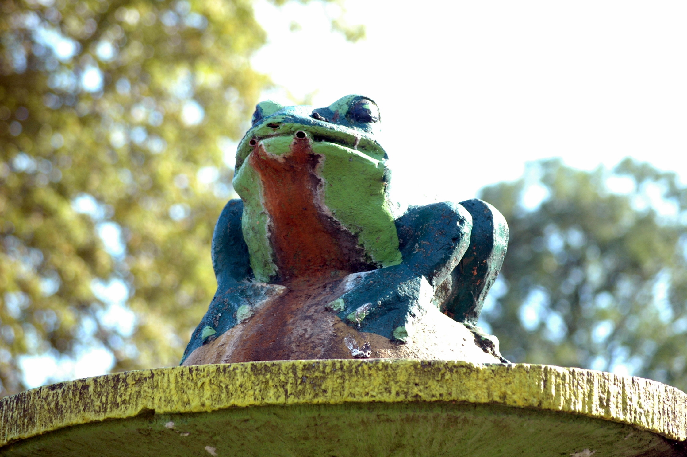 Żaba w Golczewie.